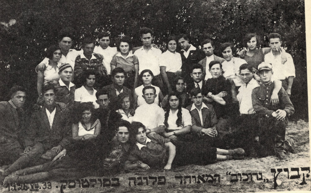 פלוגת פולטוסק (חוות גרוכוב) - 1926